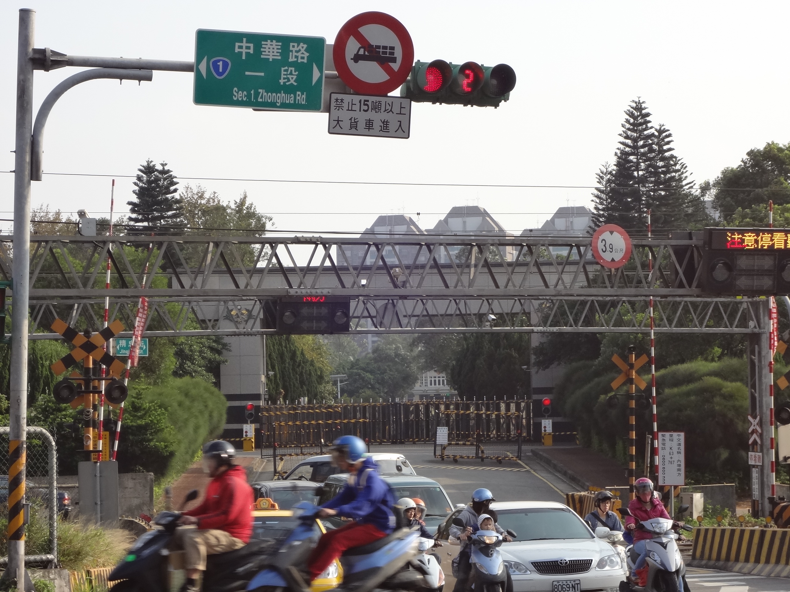 中華民國陸軍通信電子器材基地勤務廠，位於桃園縣中壢市精忠街115號，前方是內壢南方平交道。